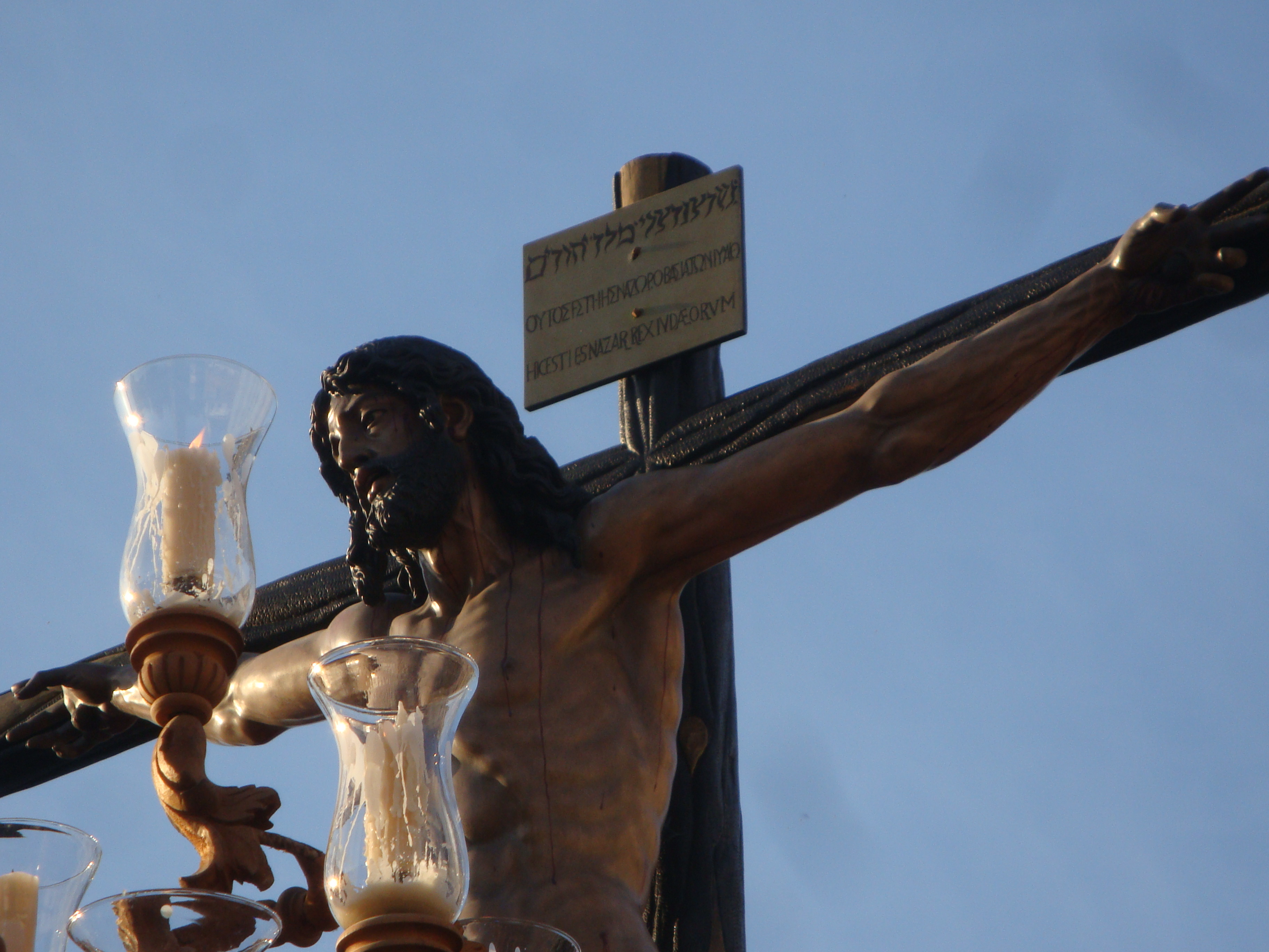 2010 Holy Week in Málaga